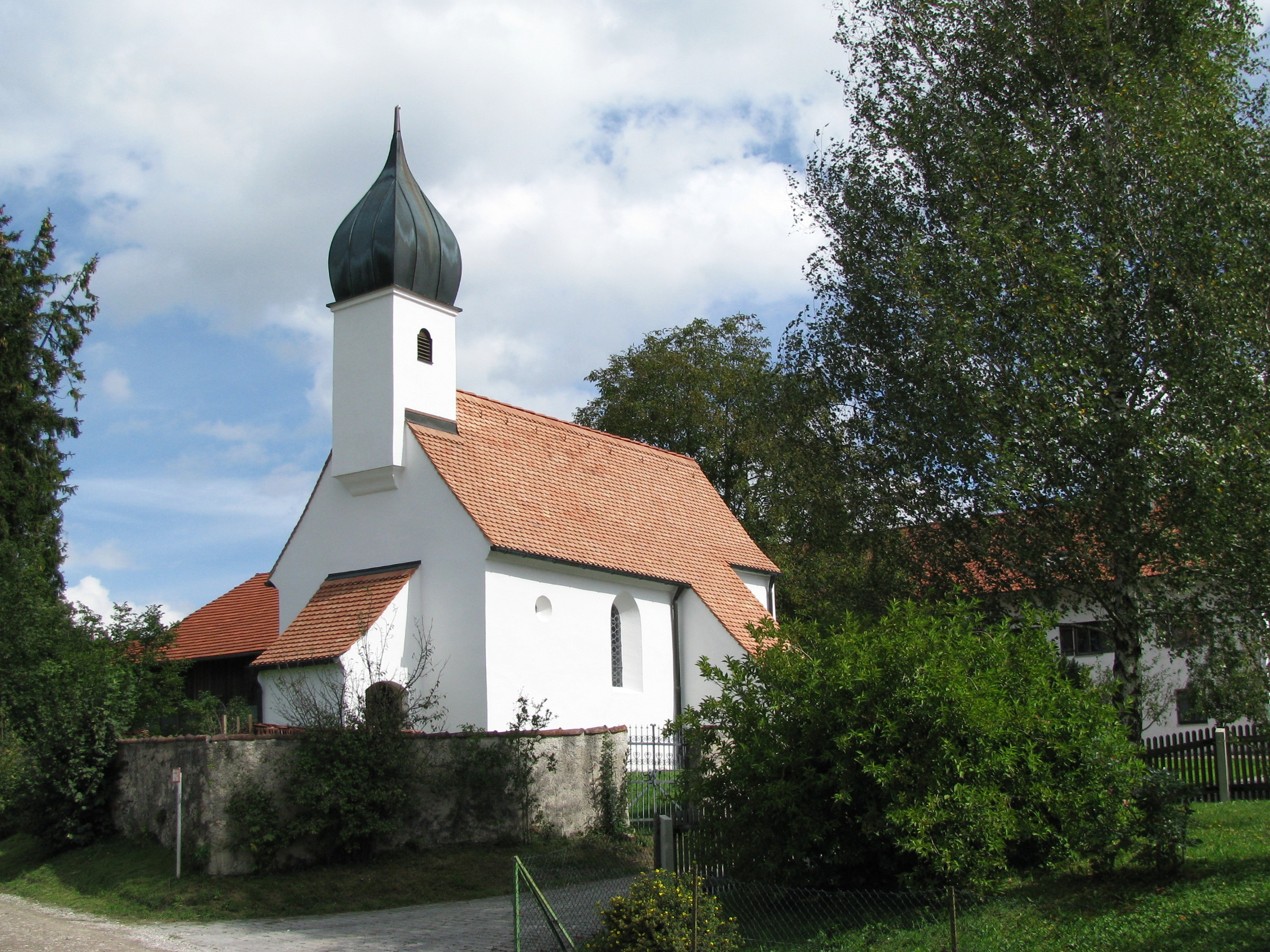 Kath. Filialkirche St. Vitus in Oberherrnhausen (offenbar fälschlicherweise beim Bayerischen Landesamt für Denkmalpflege: St. Valentin); Saalbau mit eingezogenem Chor und Zwiebel-Giebelreiter, 1. Hälfte 14. Jh., 1701 barockisiert; mit Ausstattung; Kirchhofmauer, niedrige verputzte Bruchsteinmauer, 17./18. Jh. This is a photograph of an architectural monument.